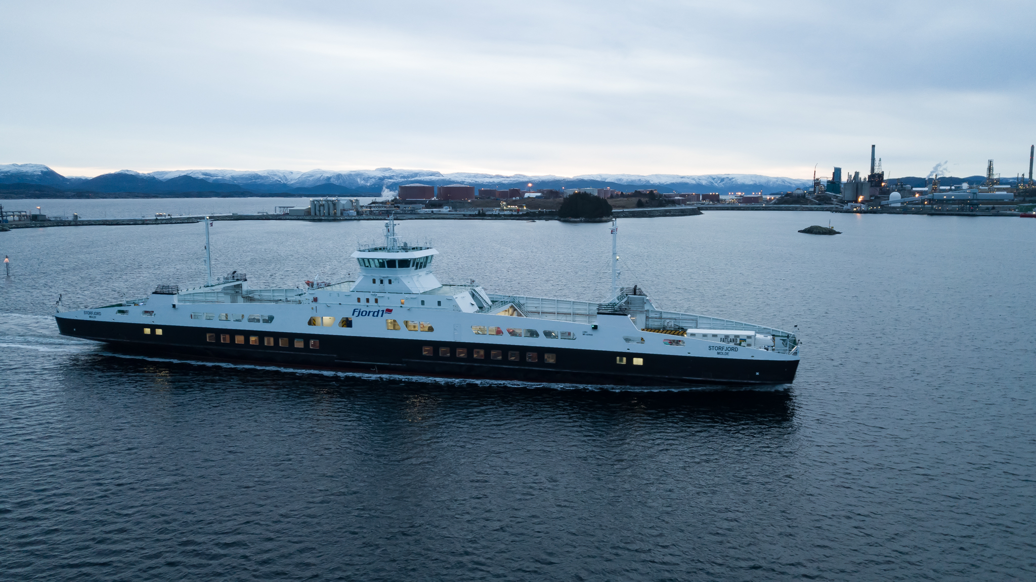 Dronebilde av MF Storfjord på veg inn mot Leirvåg. I bakgrunnen kan ein sjå Equinor Mongstad